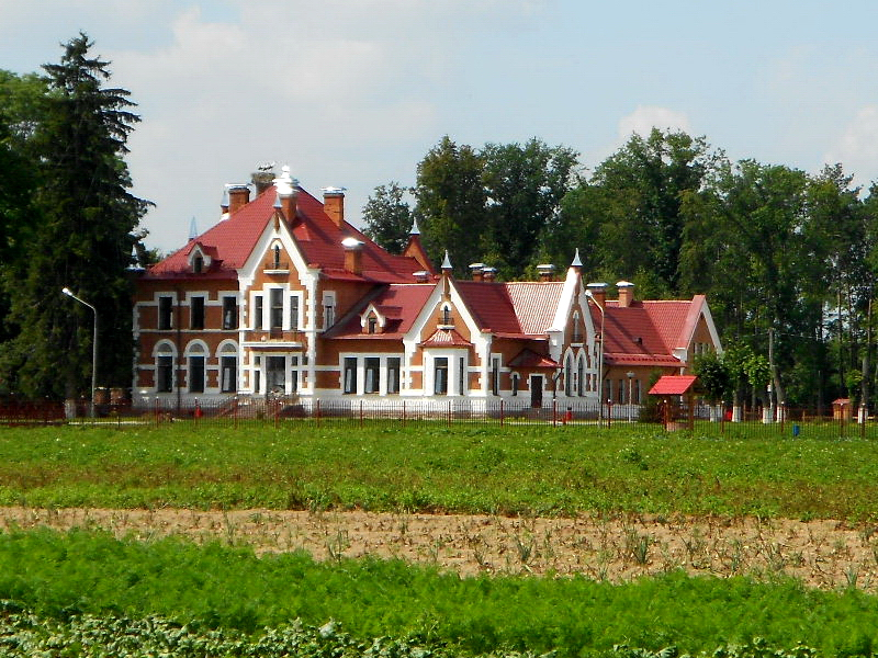 Галавічполе. Сядзіба Іваноўскіх